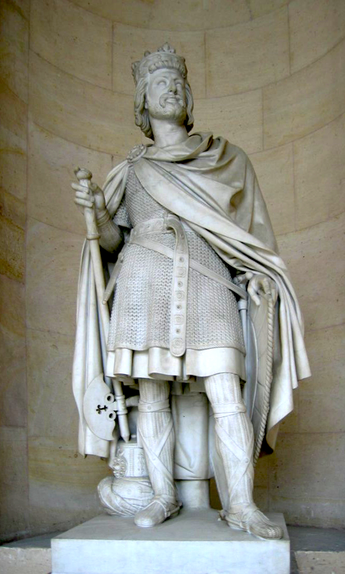 Statue Charles Martel, maire du Palais par JB Debay Père - Galerie de statue du chateau de Versaille